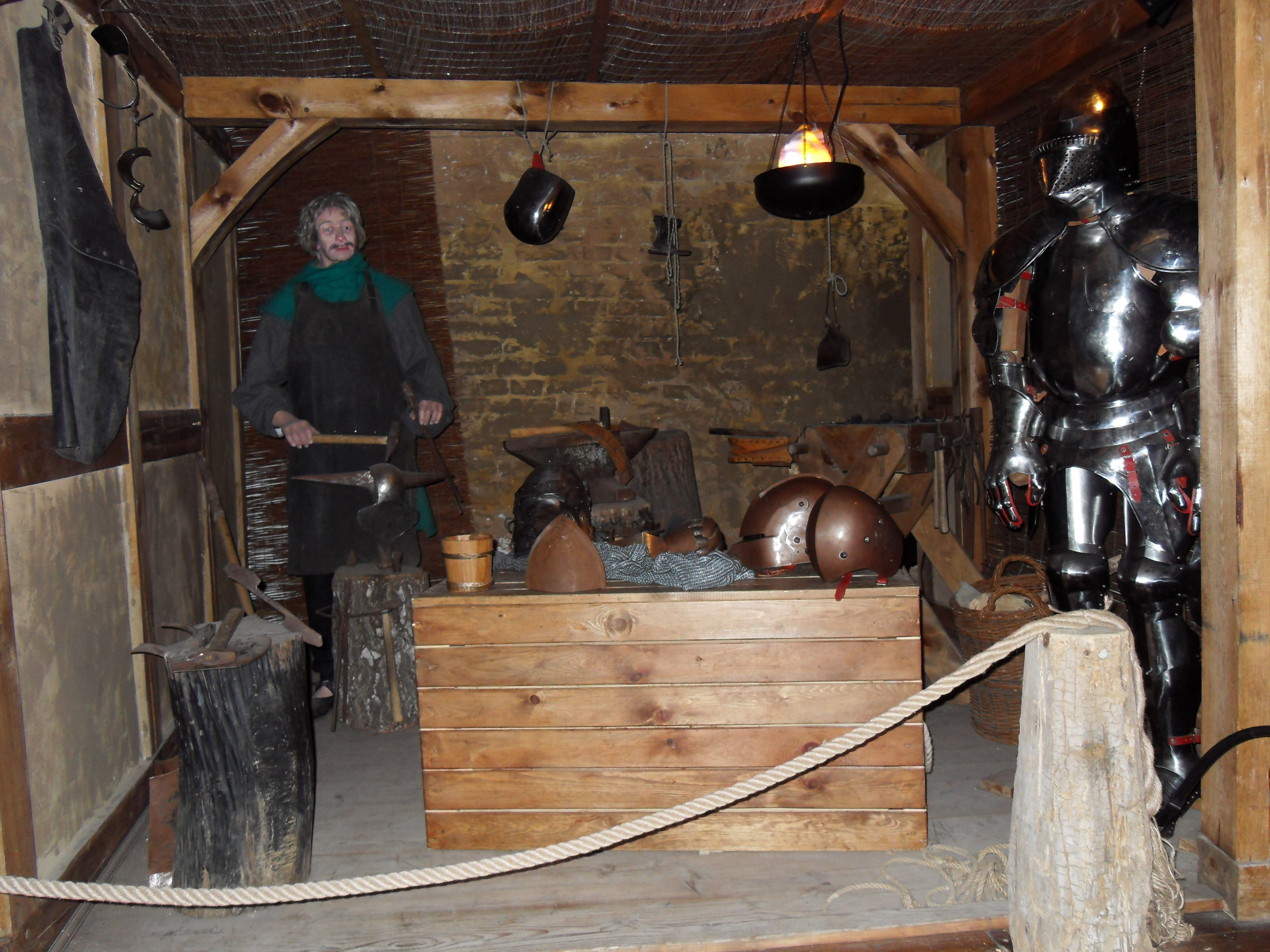 Gdańsk, Wyspa Spichrzów. Ul. Chmielna, spichlerz Błękitny Baranek - inscenizacja.